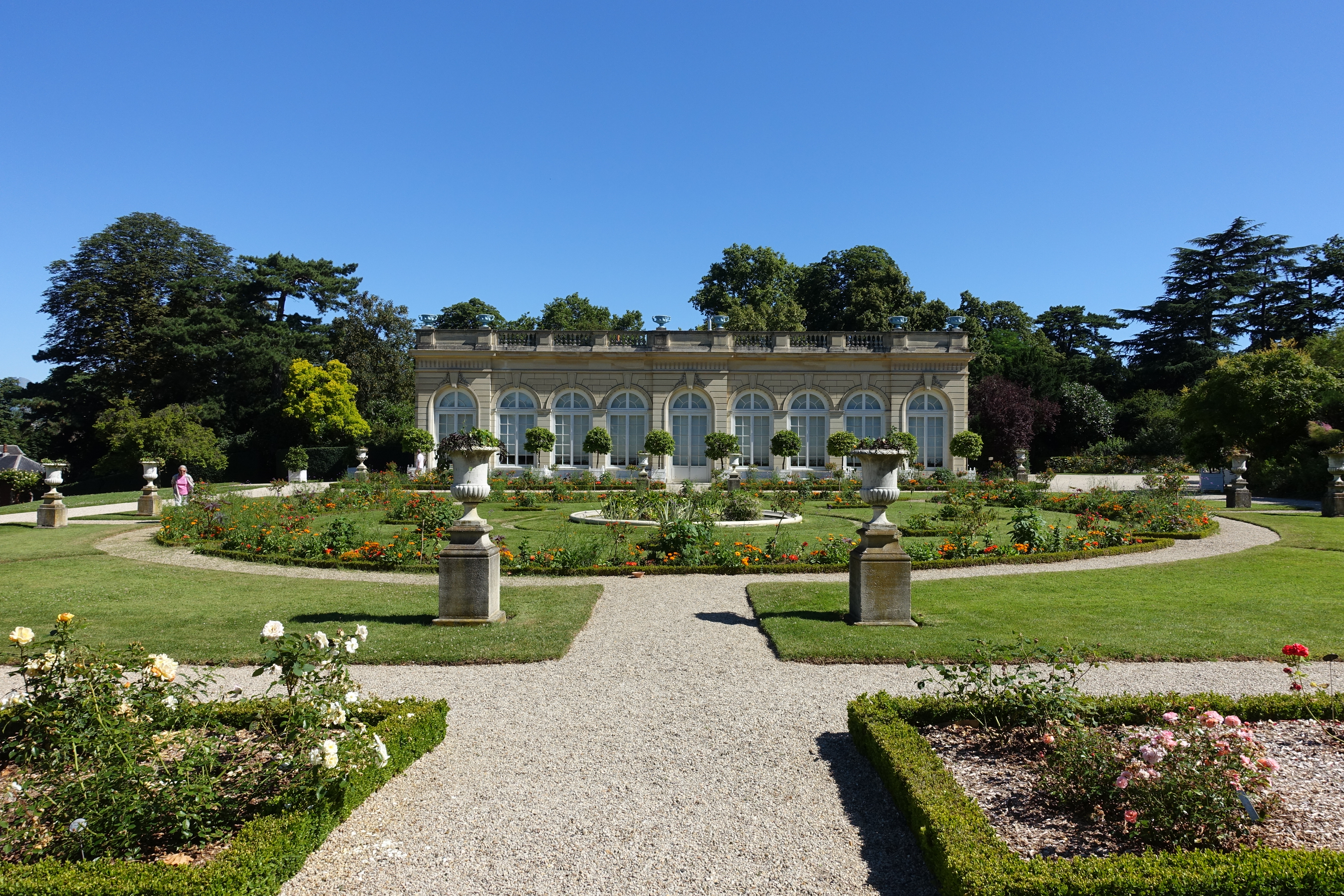 Parc de Bagatelle @ Paris